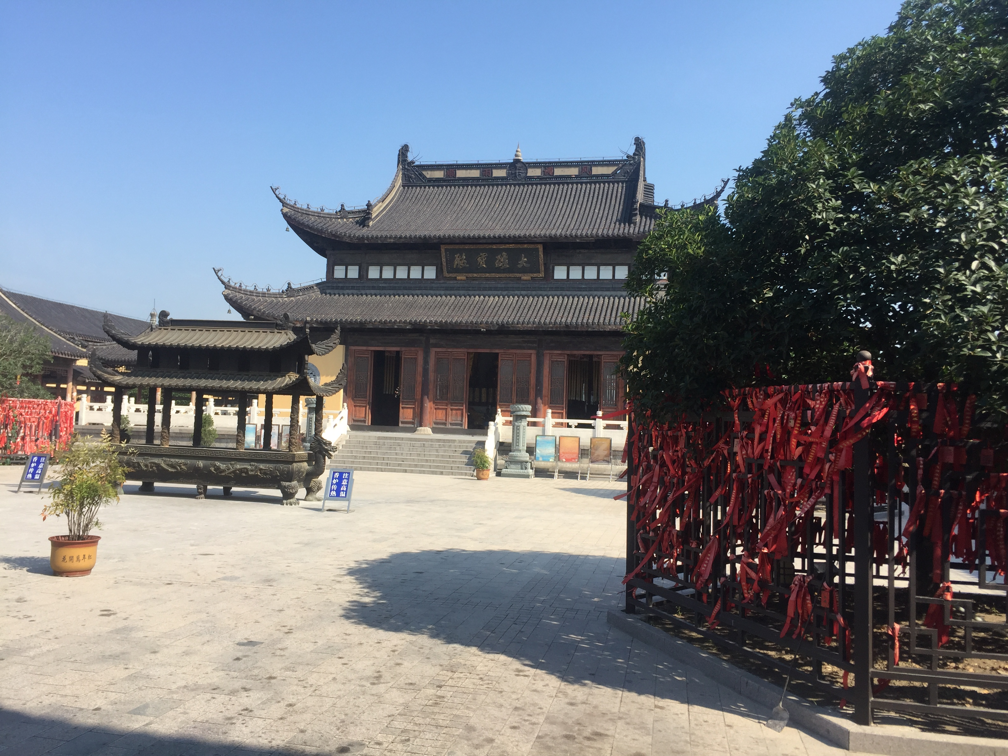 高邮市镇国寺位于江苏省扬州市高邮市城西运河，始建于唐朝僖宗年代